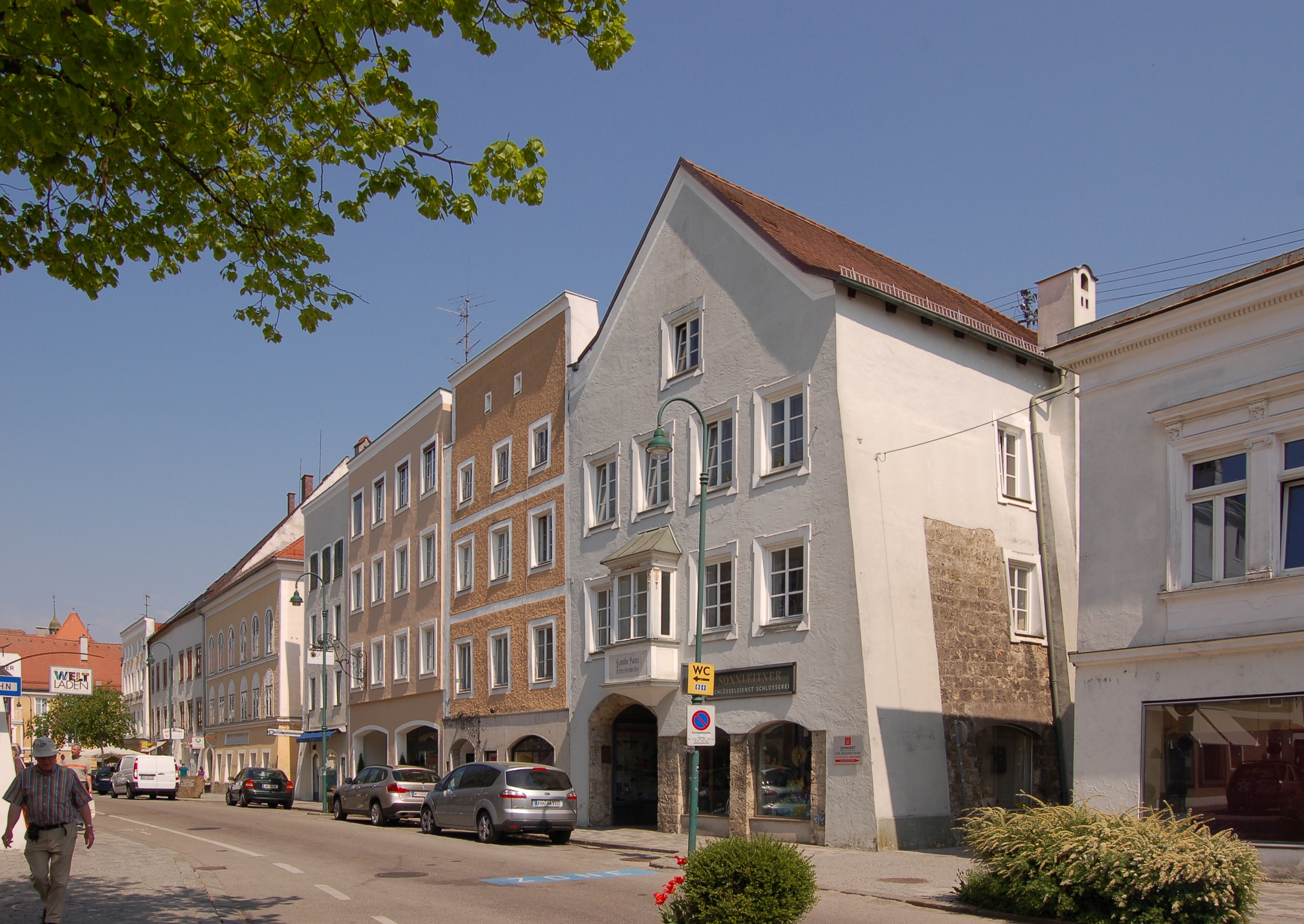 Die Häuser Salzburger Vorstadt 11-23